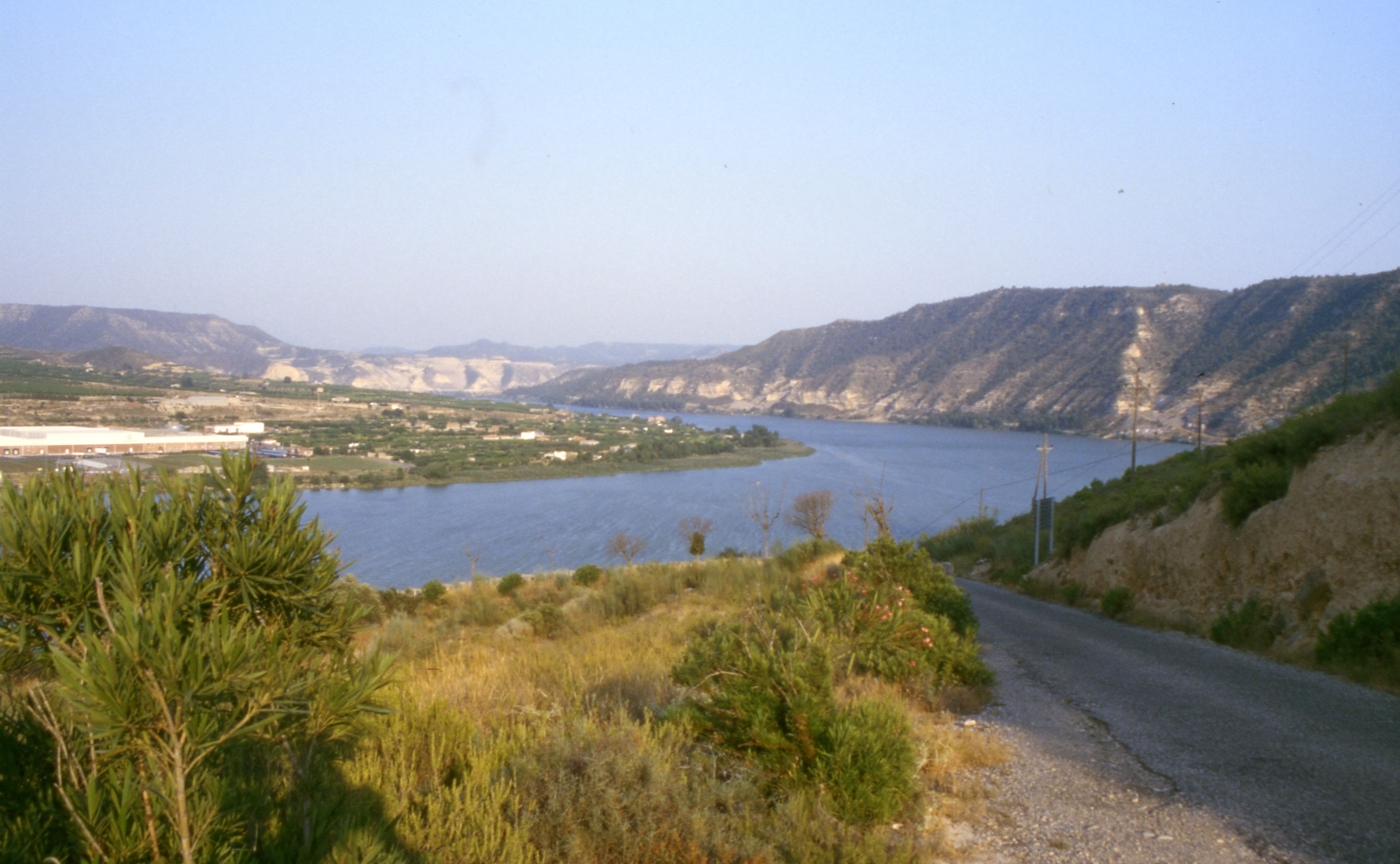 Ebro / Ansicht